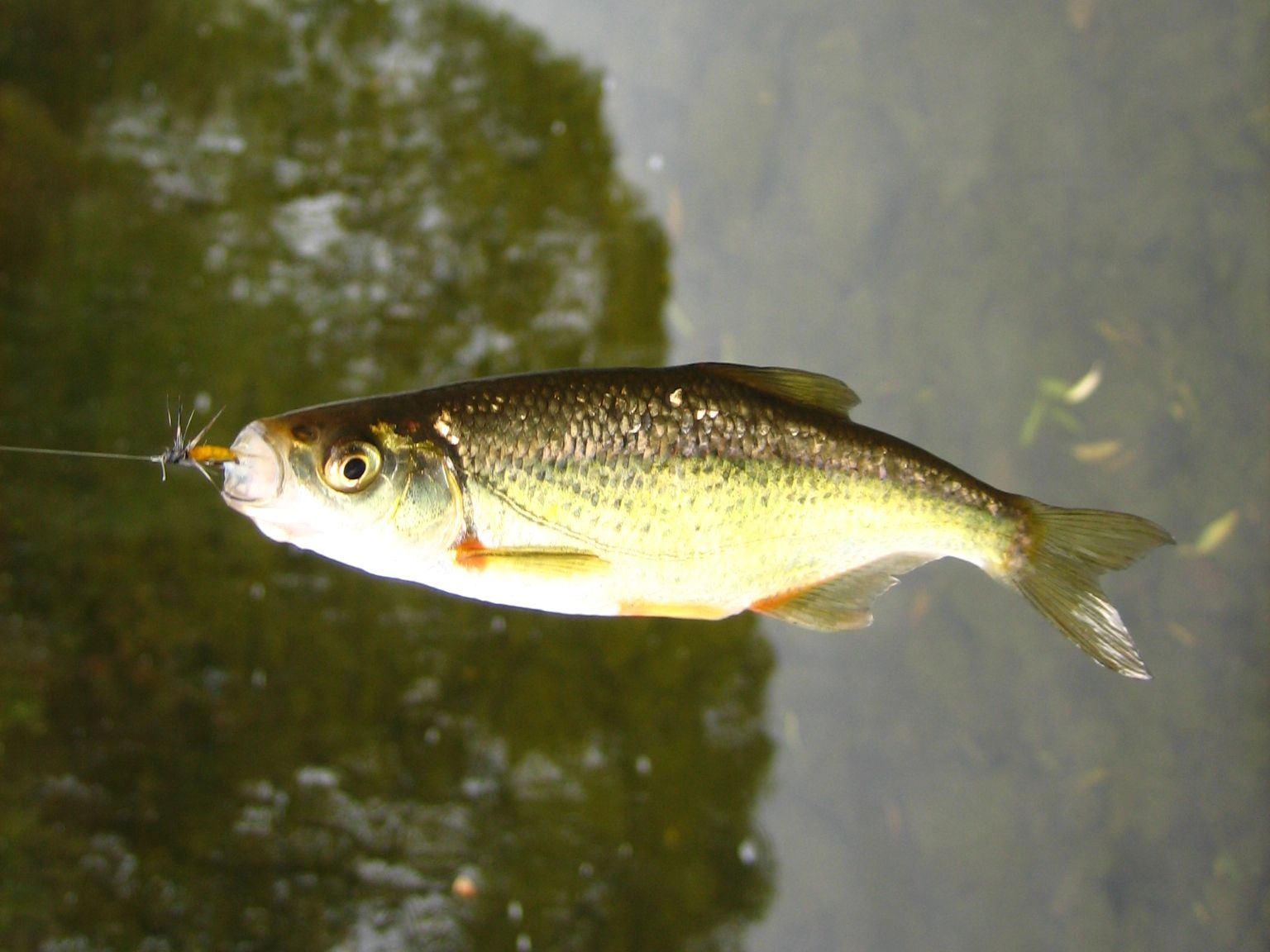 Ouklejka pruhovaná (Alburnoides bipunctatus)